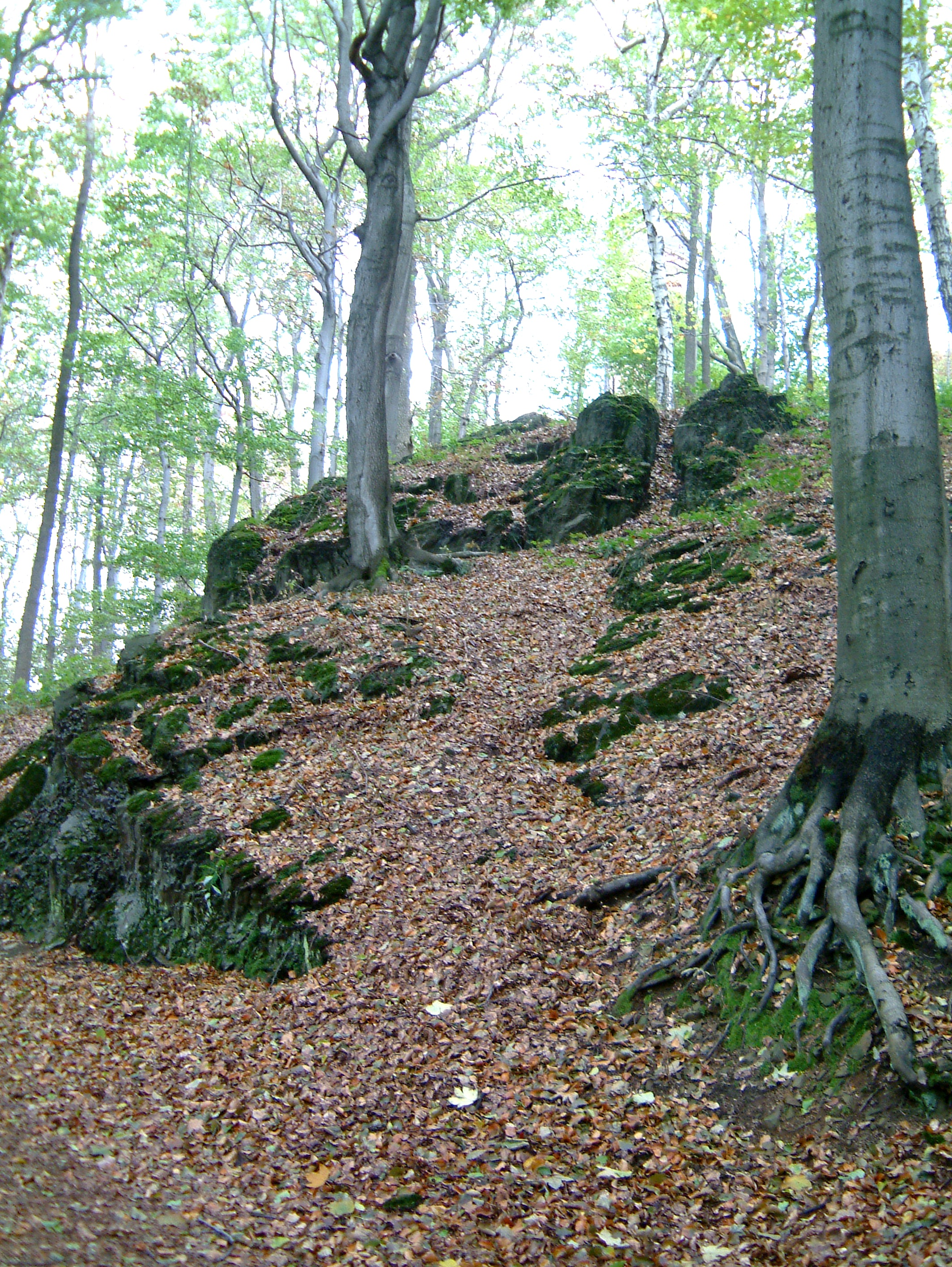 beech tree - Buchen_14_September_2003